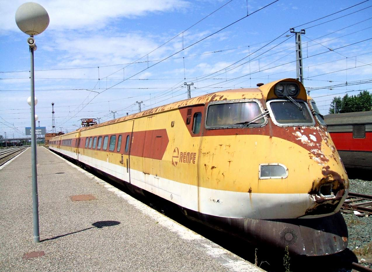 La vieja unidad del electrotren de Renfe Clase 443 ("Platanito"), estacionado en vía muerta, y en lamentable estado de conservación, en Castejón de Ebro (Navarra, España). Imagen tomada el 25 de julio de 2008